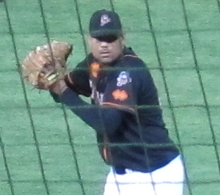 Francisco Cruceta, lanciatore della Telemarket Rimini Baseball, durante gara1 delle Italian Baseball Series, ovvero la serie finale che assegna lo scudetto italiano.